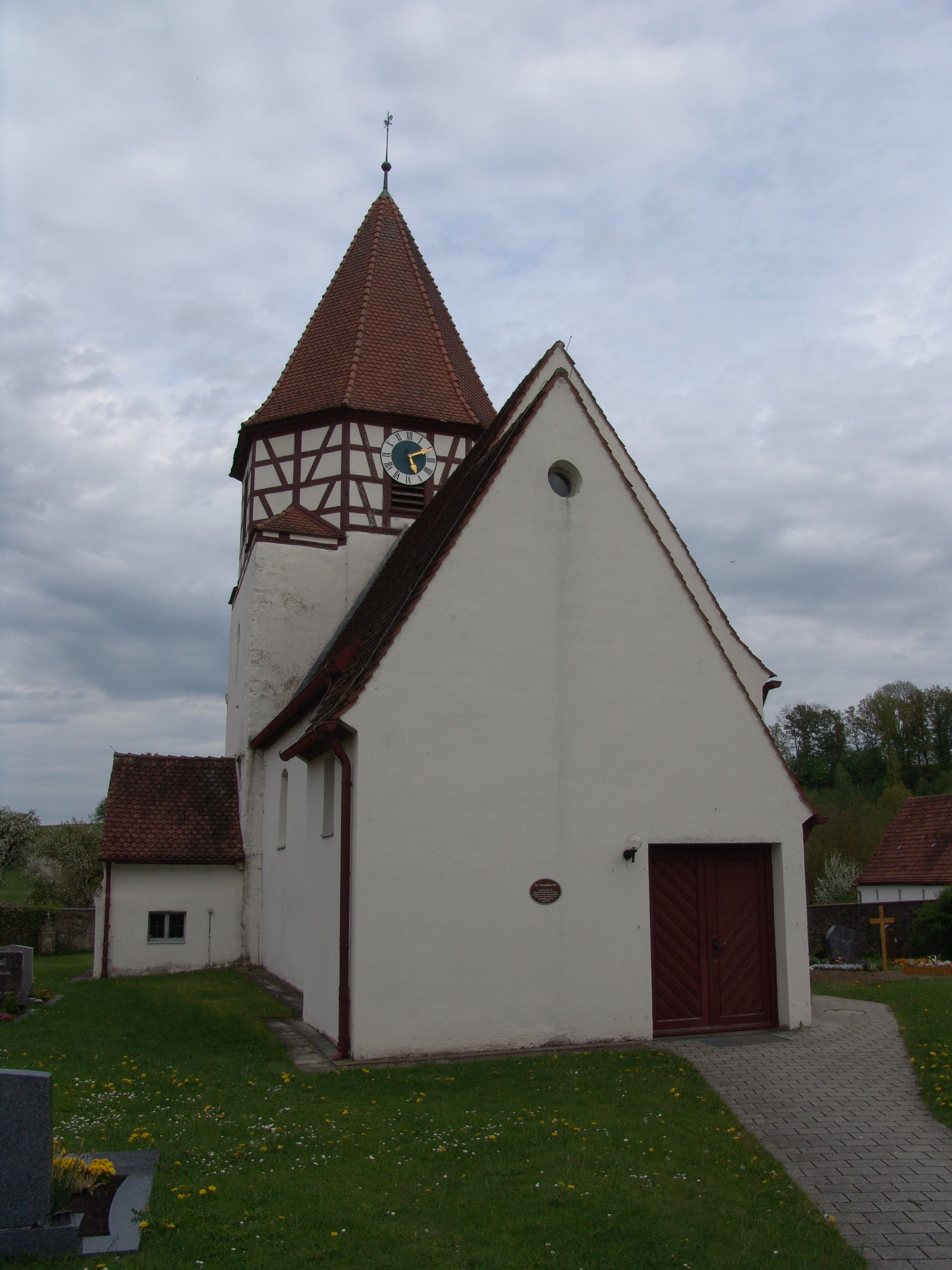 evang.-luth. Kirche St. Veit in Veitsweiler